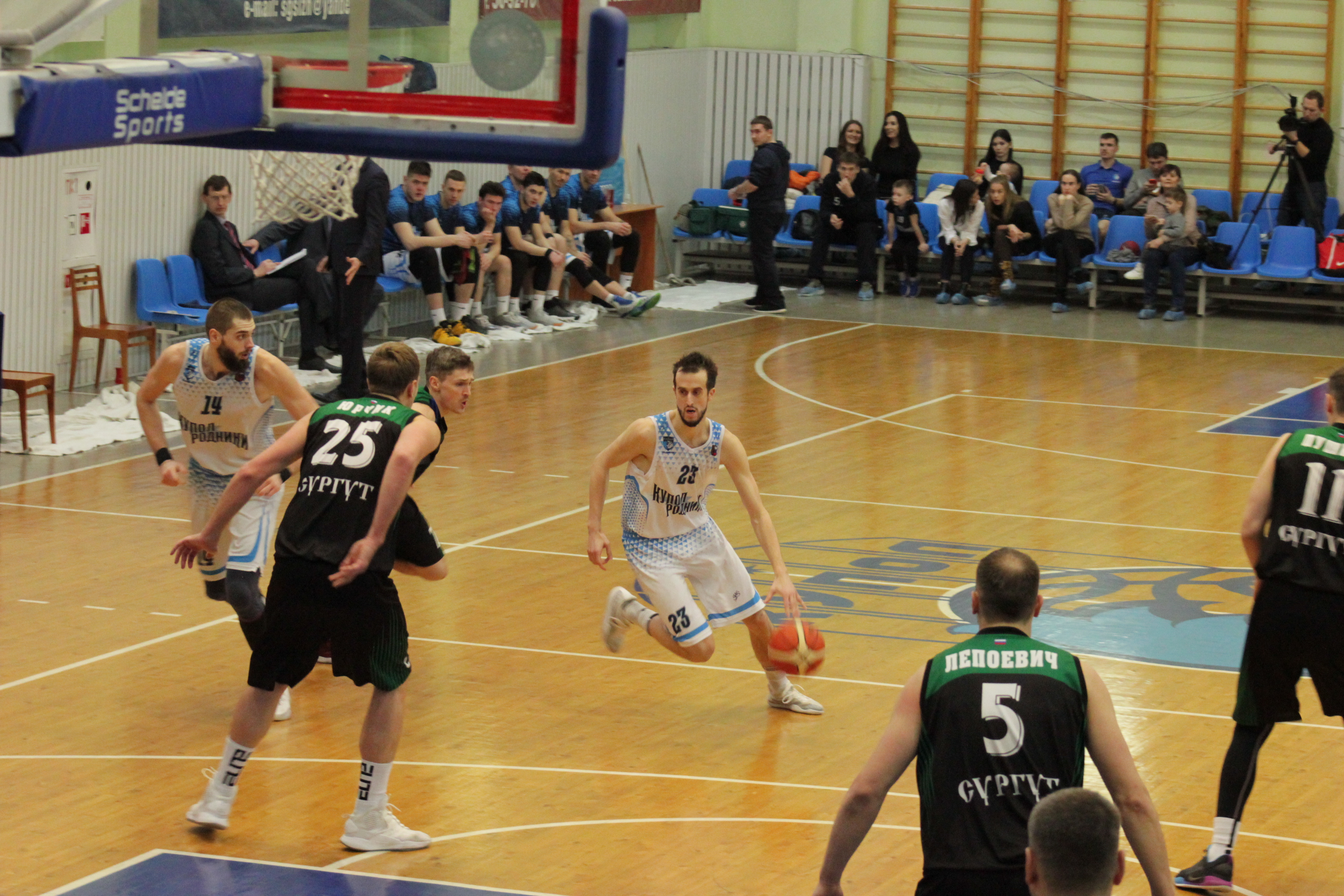 Игровой момент матча регулярного чемпионата Суперлиги БК Купол-Родники против БК Университет Югра 17 марта 2019 года